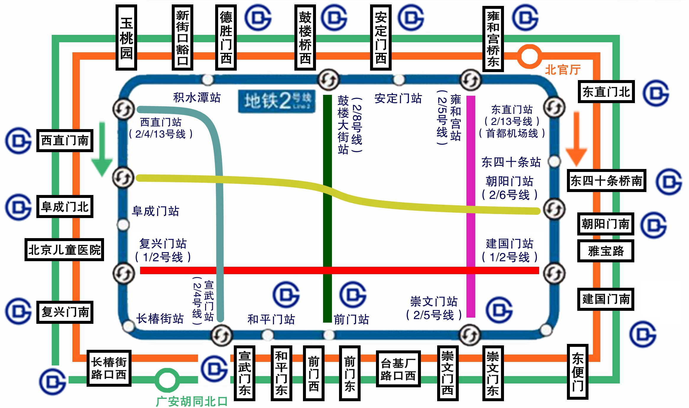 中文（中国大陆）: 北京公交44路内/外环路由及换乘图示